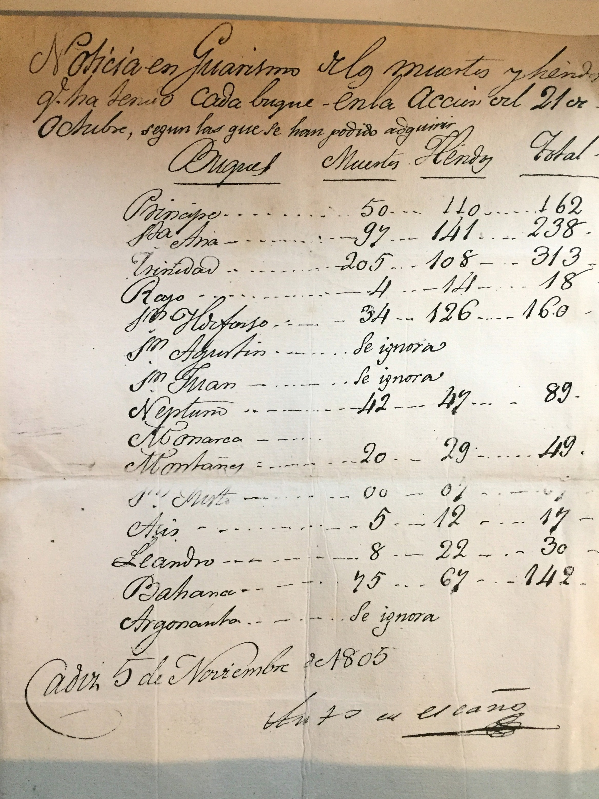 Informe de bajas sufridas por la armada española en la batalla de Trafalgar, redactado 15 días después del combate. El texto dice "Noticia en guarismo de los muertos y heridos que ha tenido cada buque en la accion del 21 de octubre, segun las que se han podido adquirir (...) Cadiz, 5 de Noviembre de 1805". Los buques son el Príncipe, Santa Ana, Trinidad, Rayo, San Ildefonso, San Agustín, San Juan, Neptuno, Monarca, Montañés, San Justo, Asís, Leandro, Bahama y Argonauta. Conservado en el Museo Naval de Madrid.